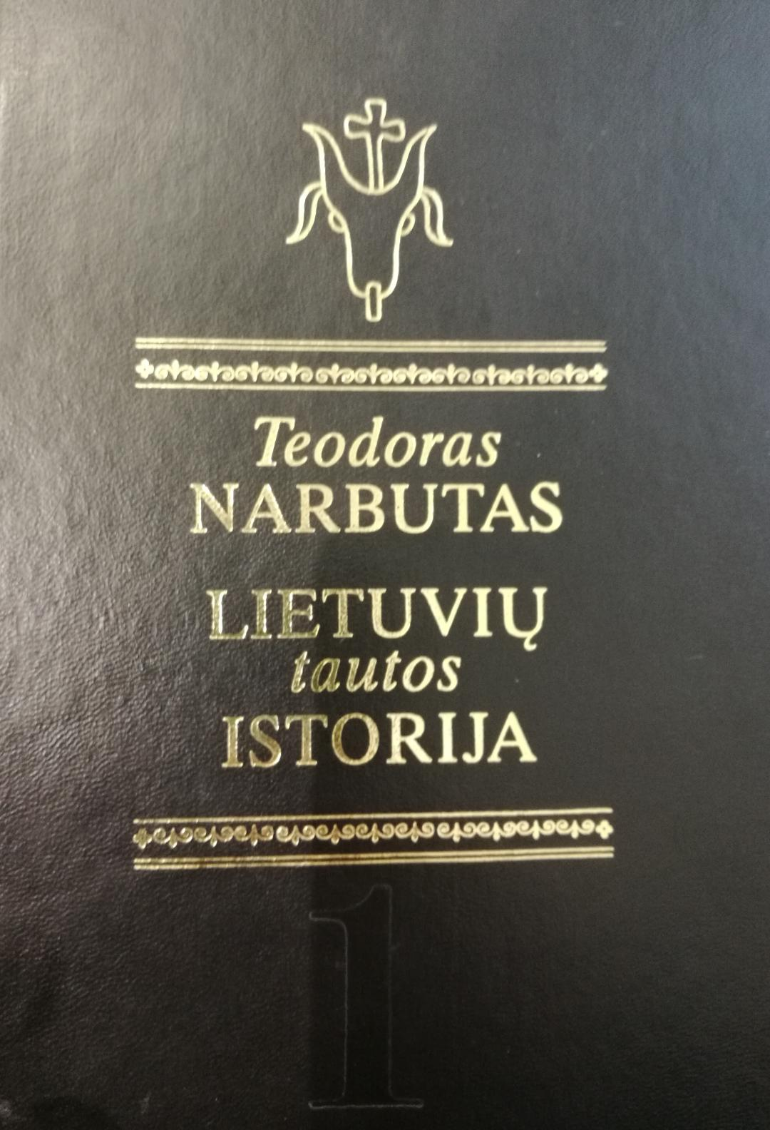 Teodoro Narbuto Lietuvių tautos istorija